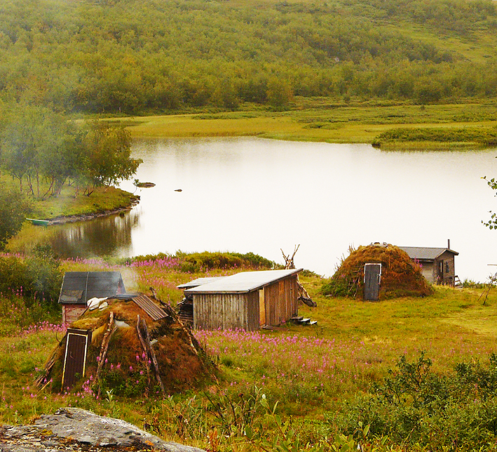 Samische Koten in Staloluokta, einem Sommerdorf im Padjelanta-Nationalpark, Schweden